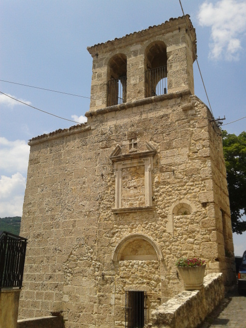 Palazzetto baronale di Bisegna